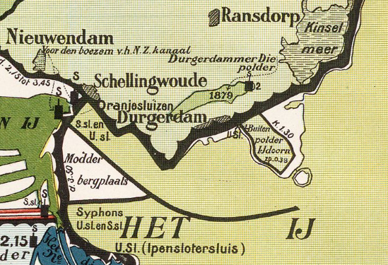 Polder IJdoorn